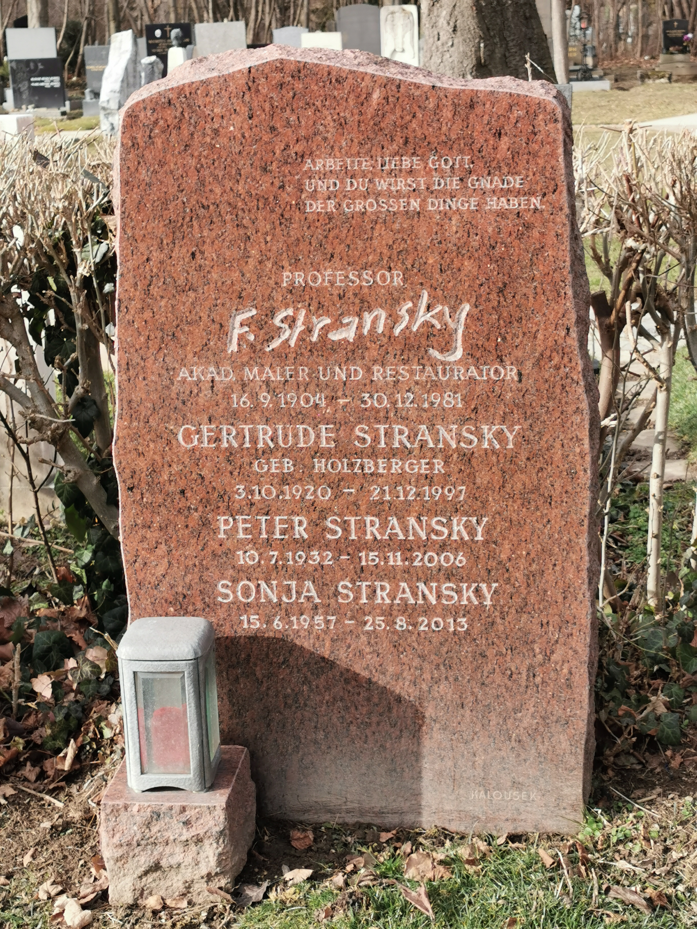 Grab von Ferdinand Stransky auf dem Wiener Zentralfriedhof